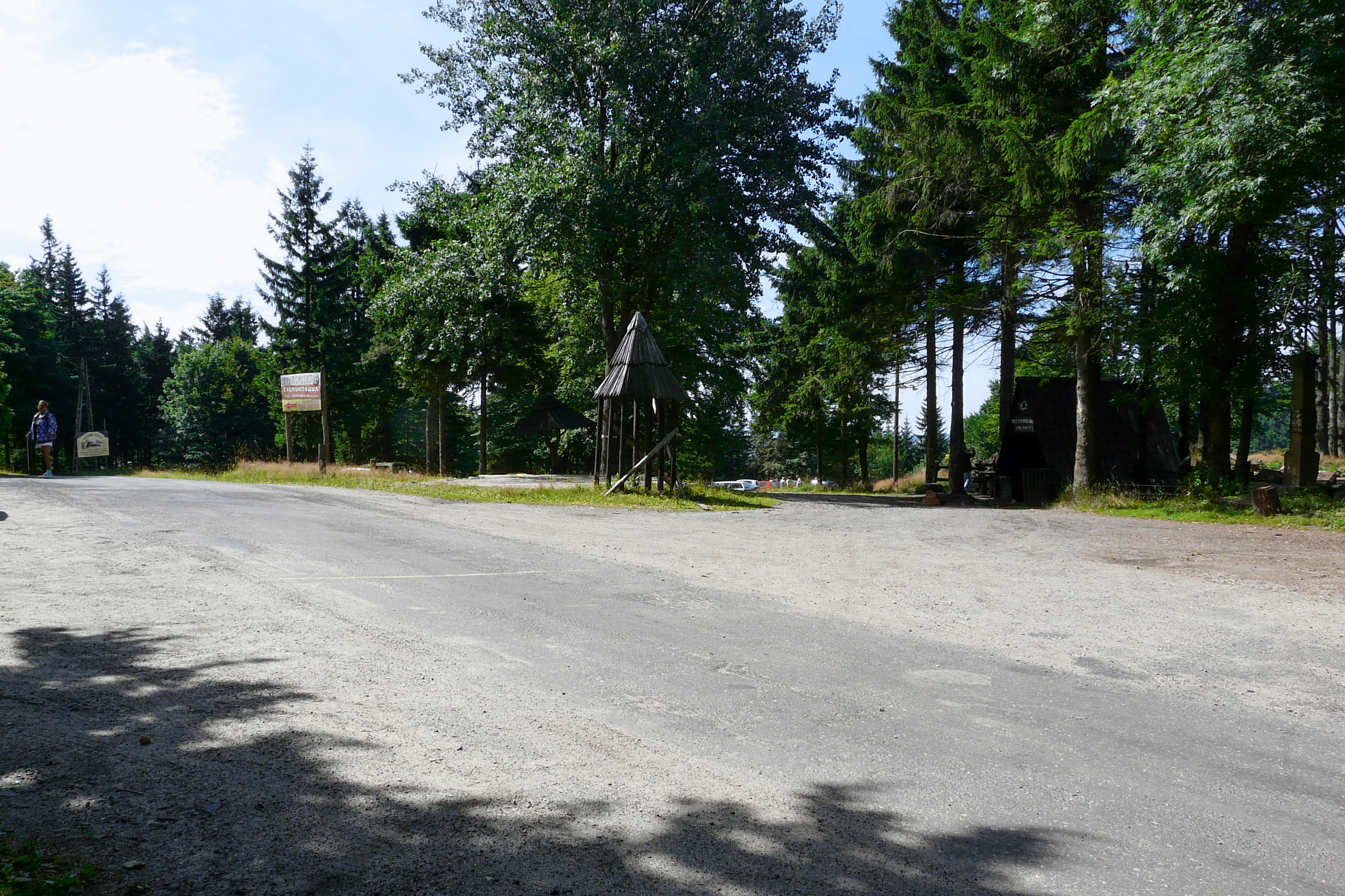 Przełęcz Jugowska